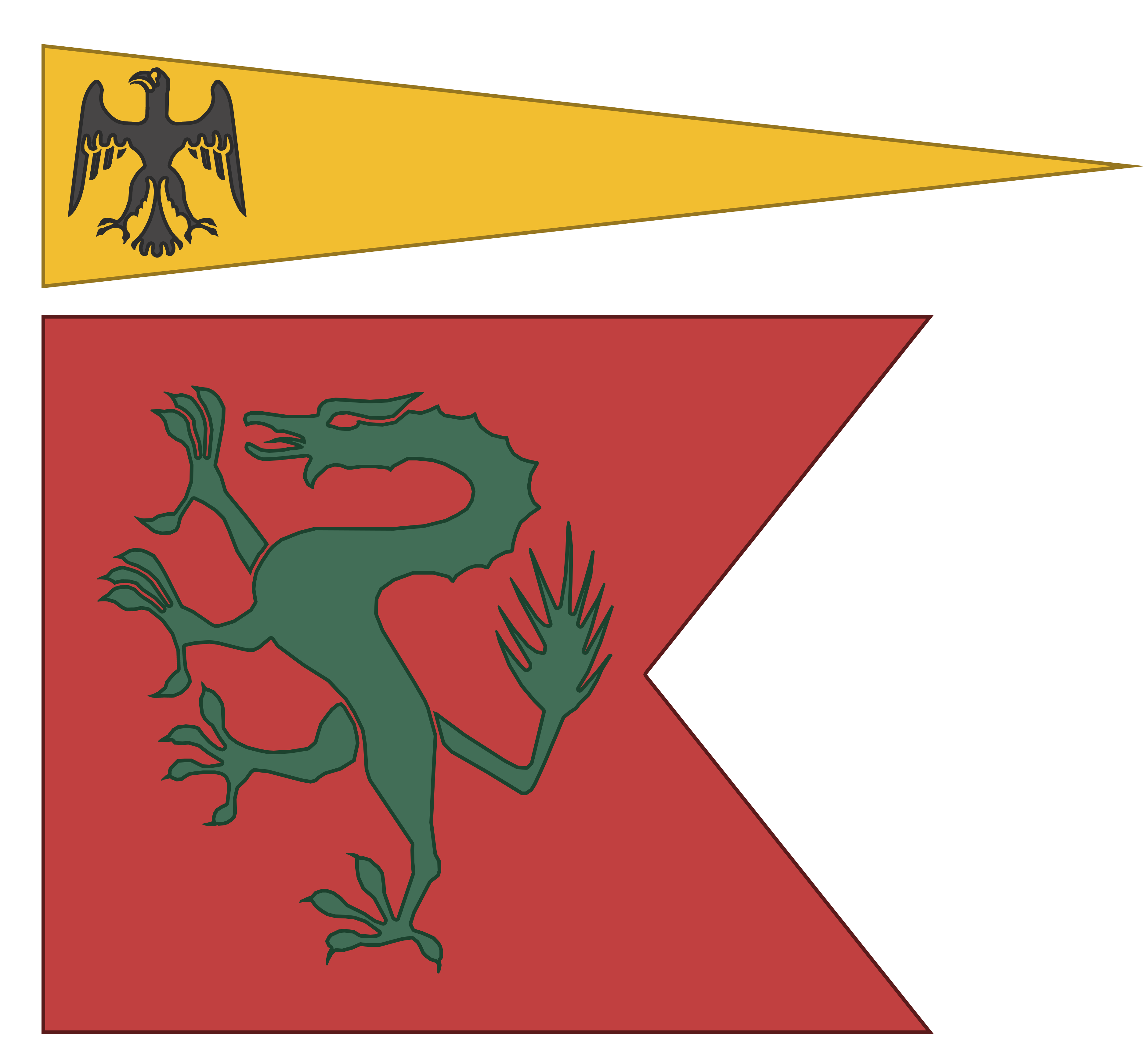 Banners of Terni's ghibellines at Montaperti (in first half of 13th century).